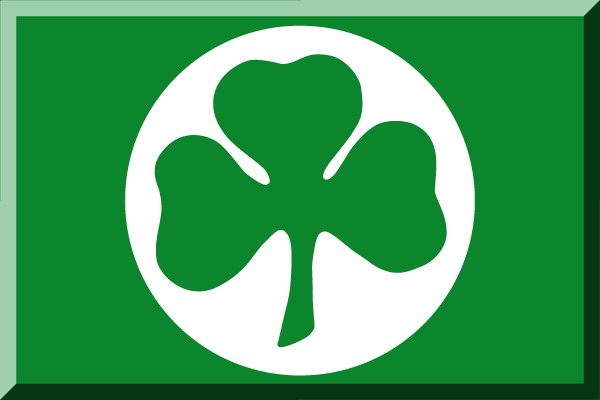 Verde con trifoglio Verde su cerchio Bianco